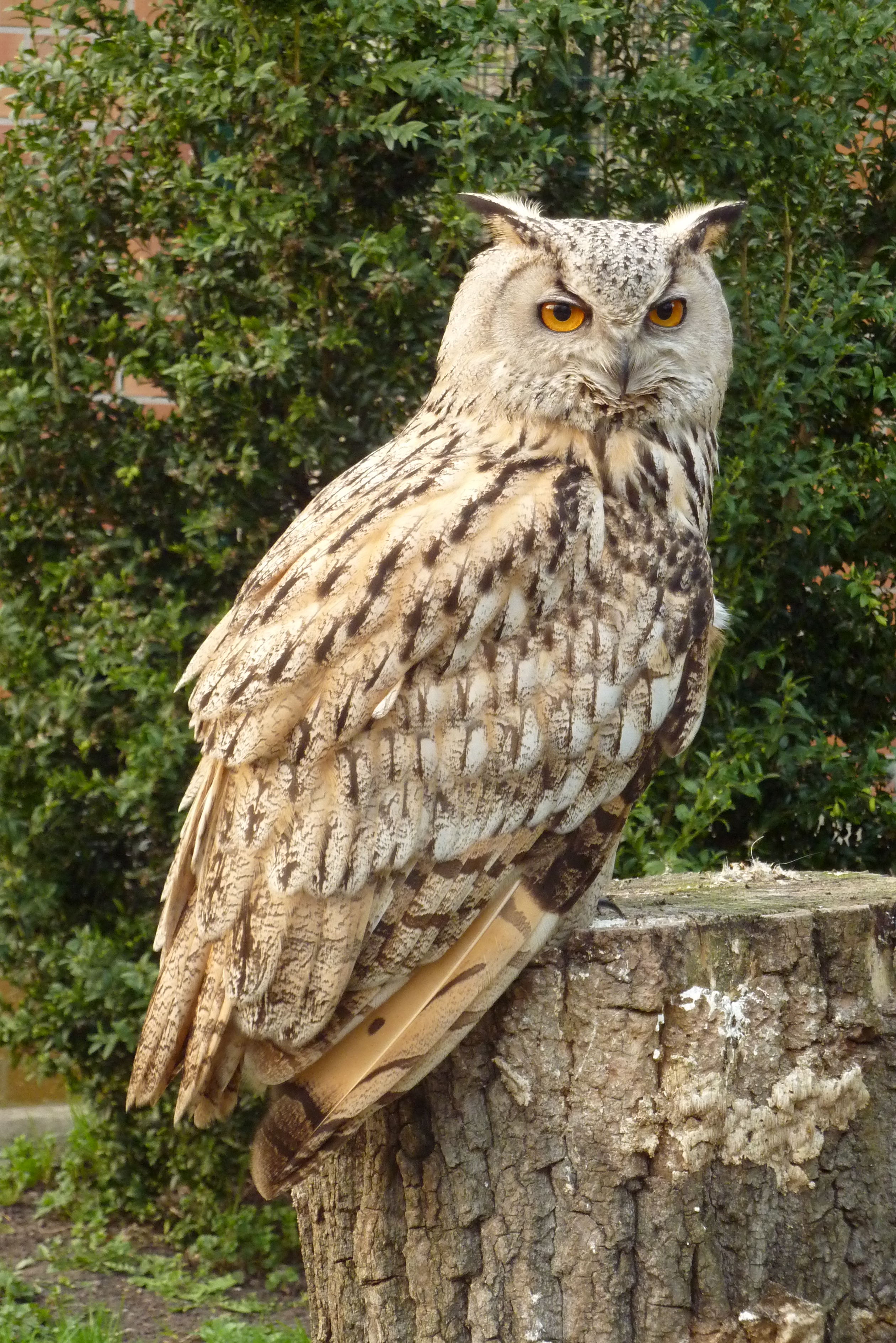 Turkmenen-Uhu (Bubo bubo omissus) im Tierpark Berlin (Friedrichsfelde). Standort südwärts vom Affenhaus.